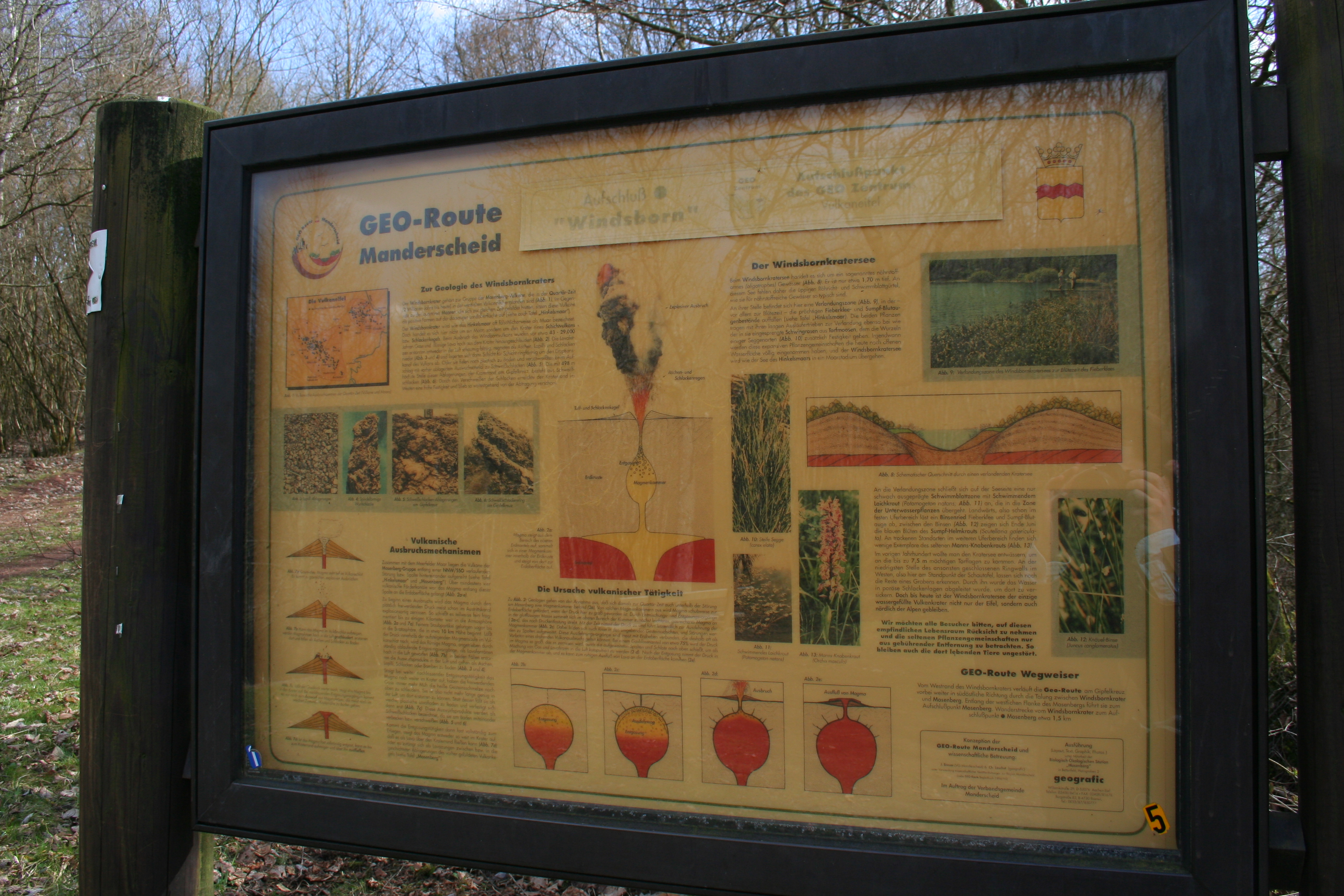 Windsborner Bergkratersee in der Vulkaneifel, Infotafel am See